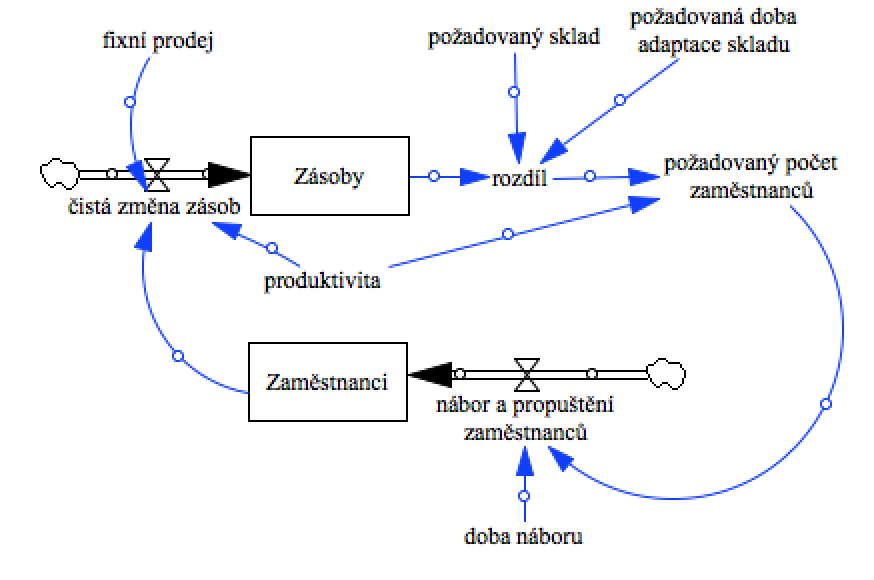 SFD, oscilace - řízení zásob ve Vensim